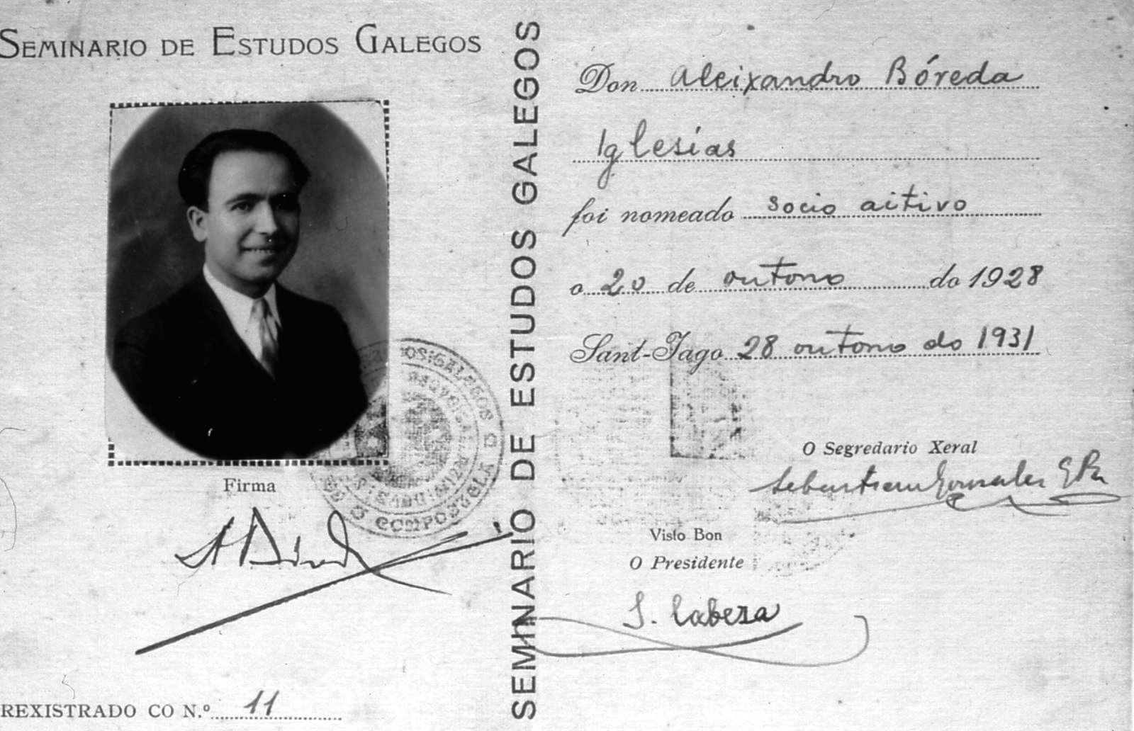 Seminario de Estudos Galegos. Alexandre Bóveda foi nomeado socio aitivo o 20 de outono do 1928, Sant-Iago, 28 de outono de 1931.